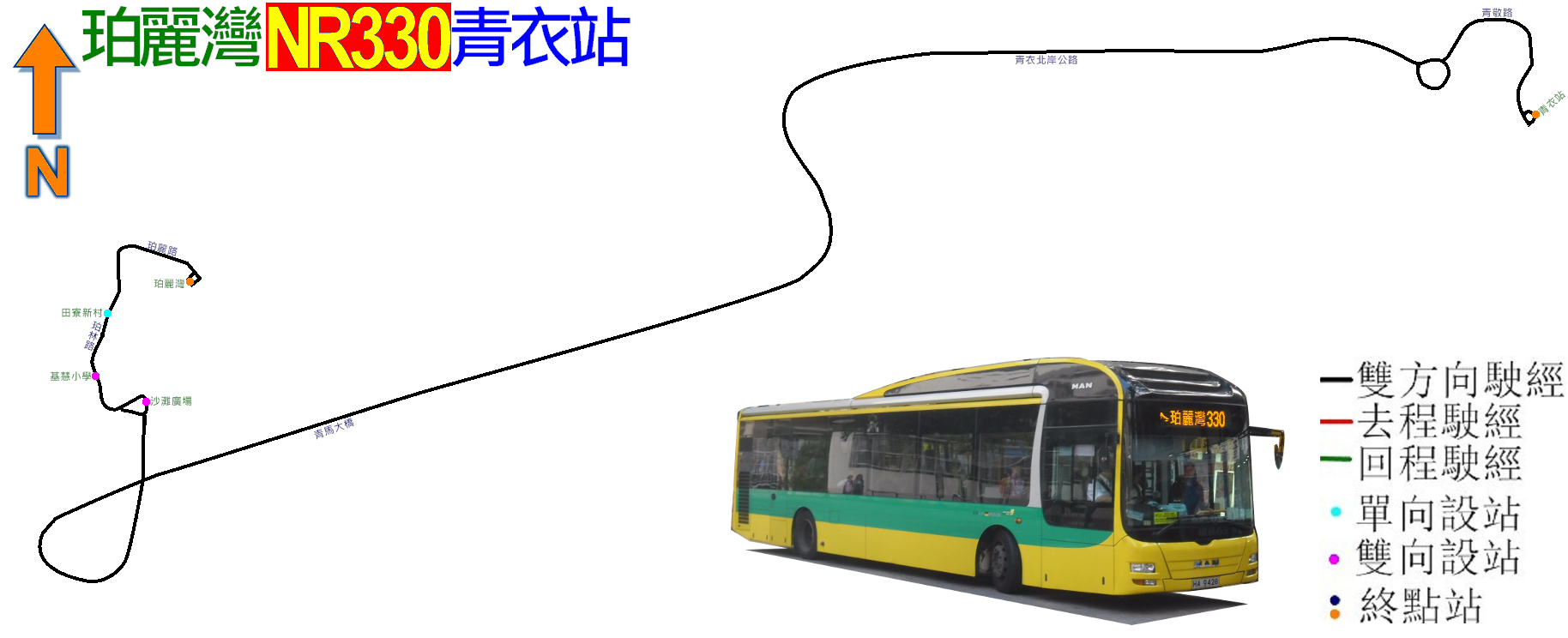 中文（香港）: 珀麗灣巴士NR330線的走線圖